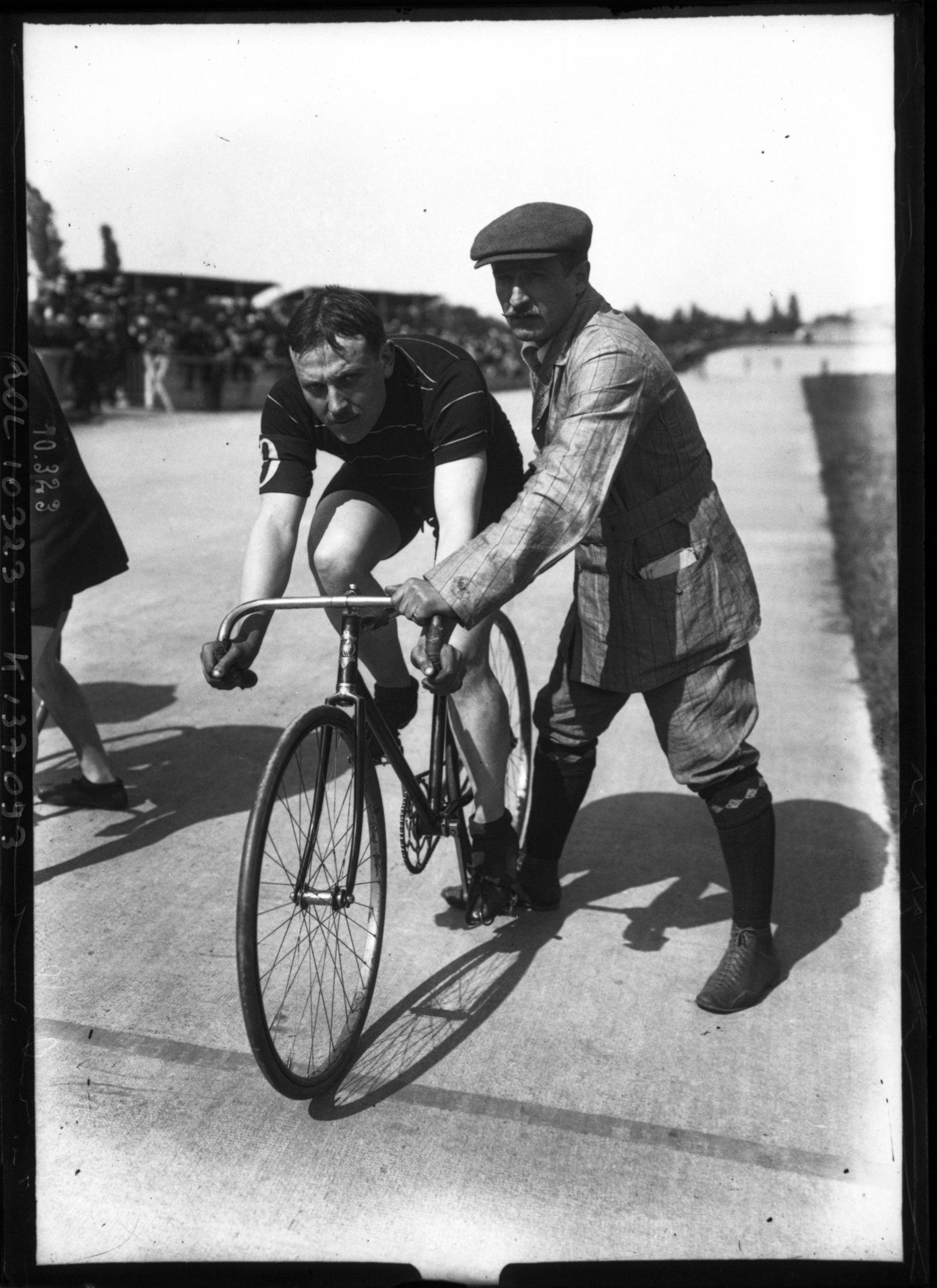 Auffray, à l'arrivée du Bordeaux-Paris, avec arrivée au Parc des Princes